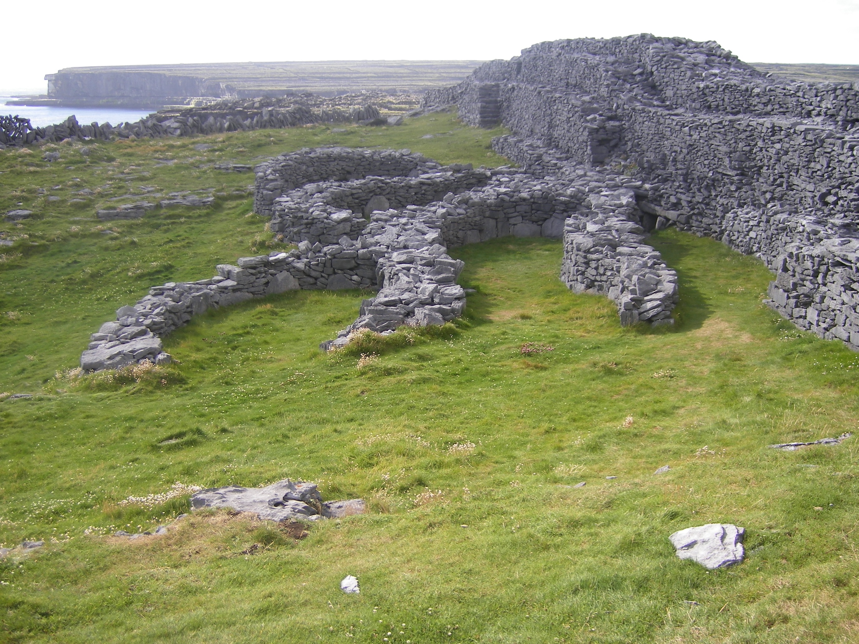 l'intérieur du fort